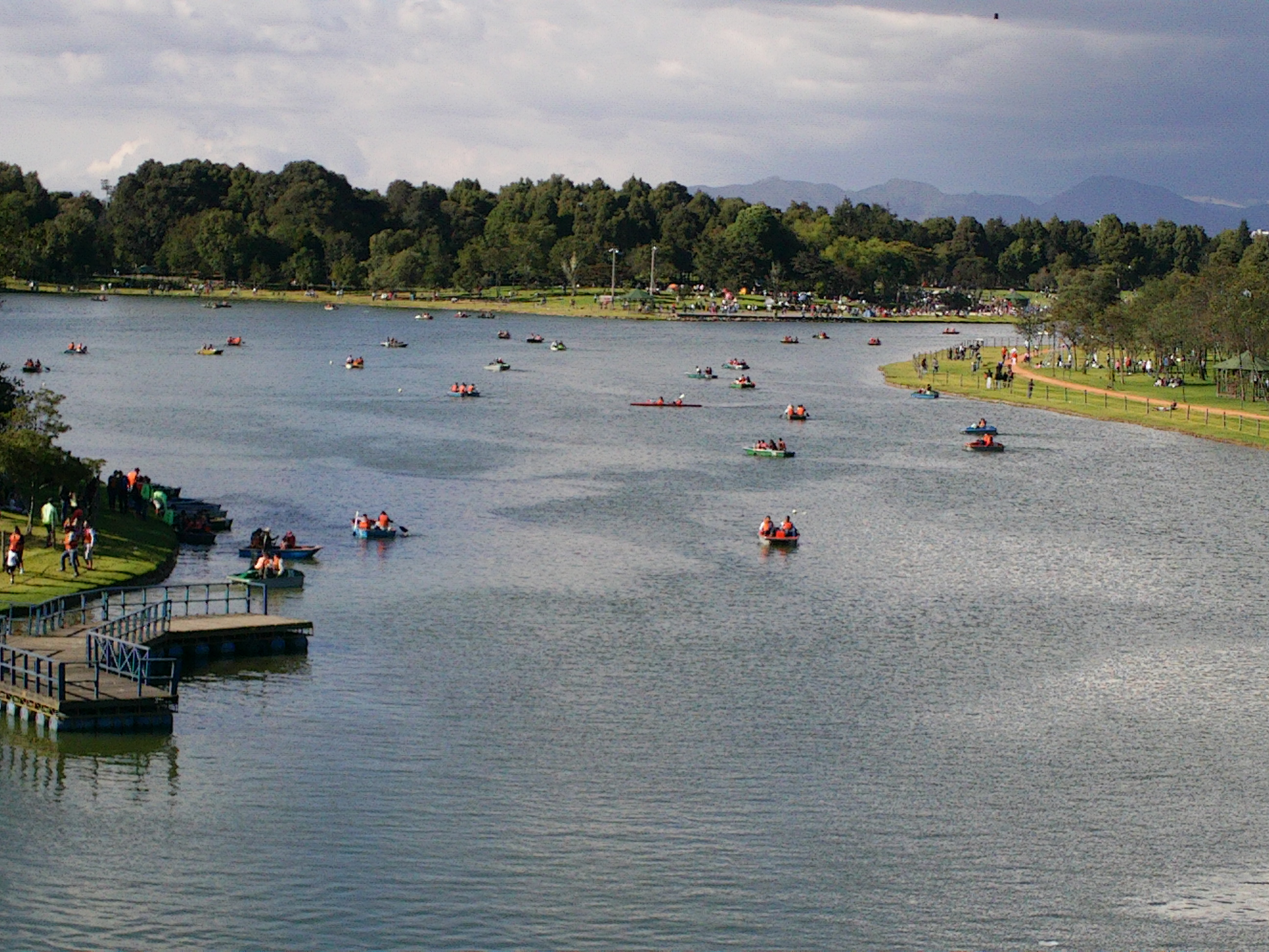 Esta fotografía fue tomada en el municipio colombiano con código 11001.